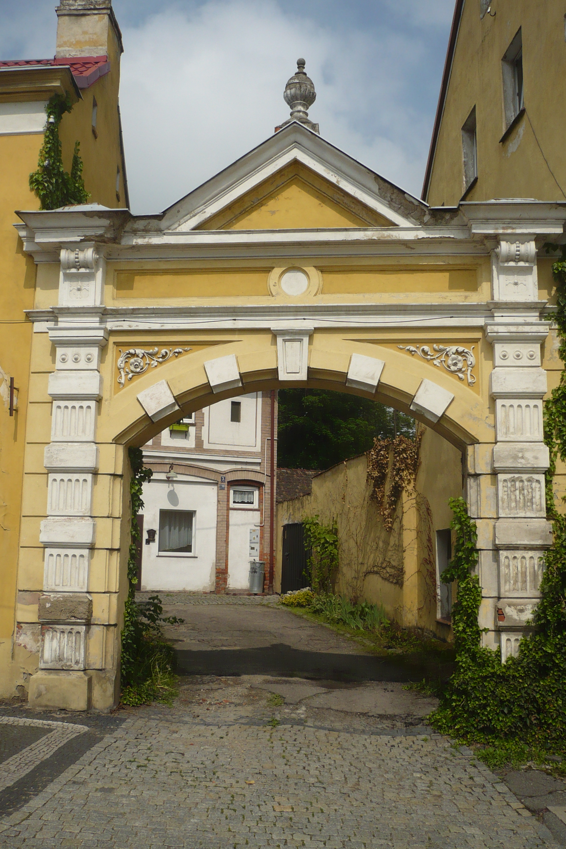 Złoty Stok